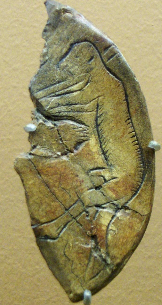 Demi-rondelle gravée d'un homme, os, paléolithique (Grotte Sous-Grand-Lac, Meyrals Dordogne), musée des antiquités nationales, Saint-Germain en Laye.